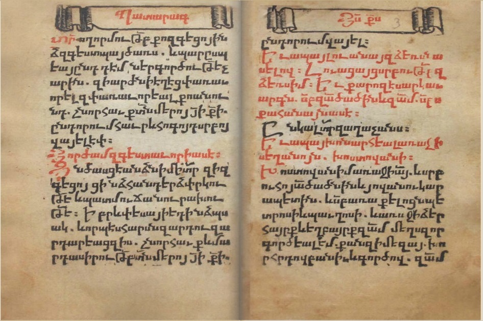 Патарагатетр, издание 1513 года